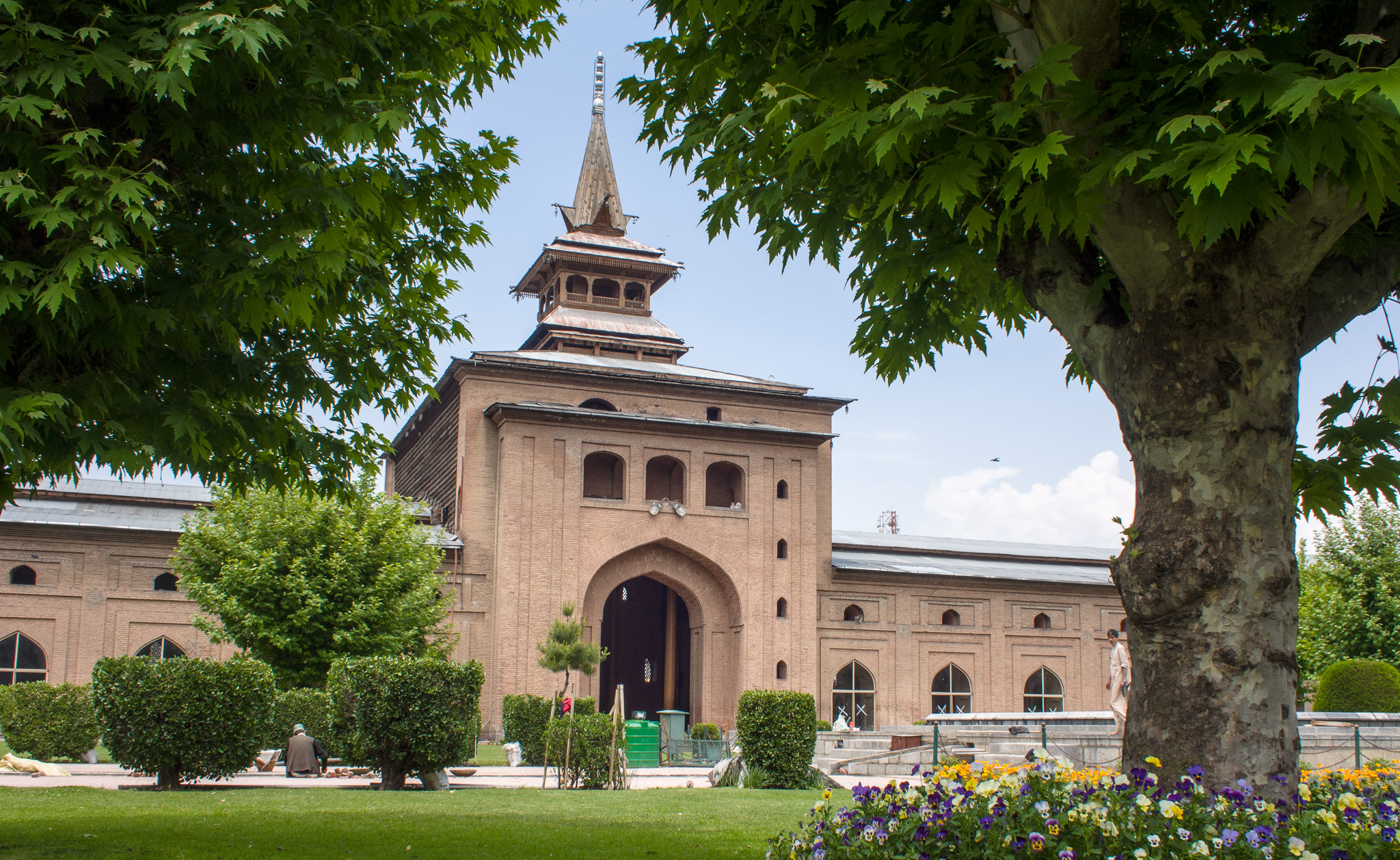 Jama Masjid, Srinagar